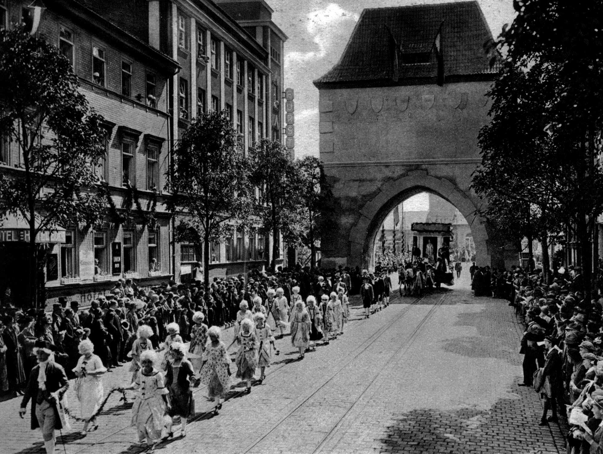 Festumzug zur Tausendjahrfeier in Nordhausen, 1927. Die Abbildung zeigt das Friedensfest der Nordhäuser Jugend zum Hubertusburger Frieden 1763